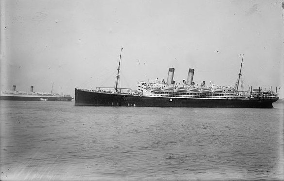 Arabic (III), ocean liner